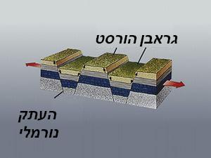 סרטוט סכמטי של הצורות הגאולוגיות הורסט וגראבן. רישיון {